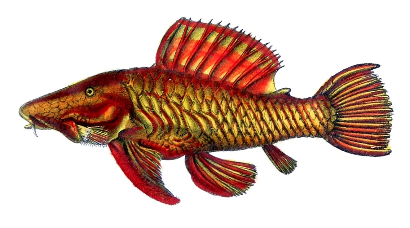 Hypostomus aurentiacus = Parancistrus aurantiacus